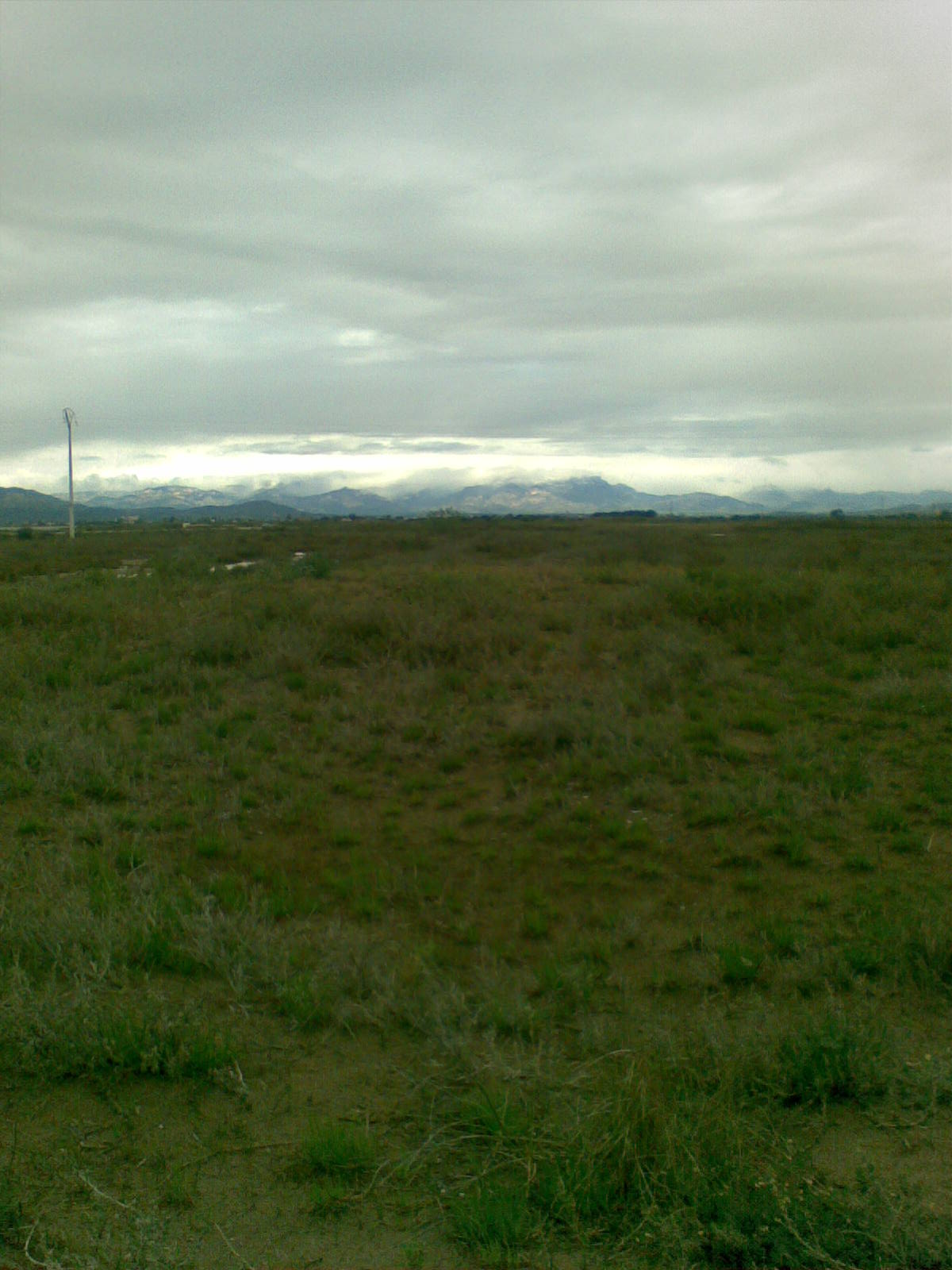 Paisatge típic del Delta de l'Ebre.